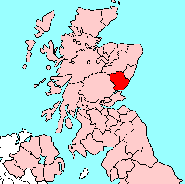 Angus